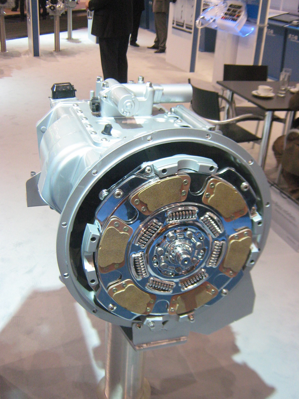 Internationale Automobilausstellung für Nutzfahrzeuge in Hannover 2010